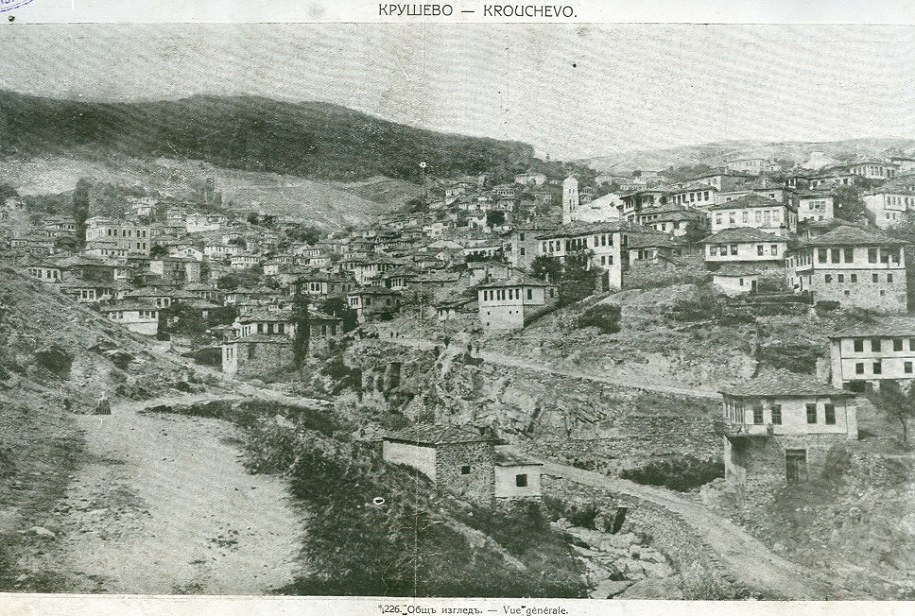 Крушево в началото на 20 век.